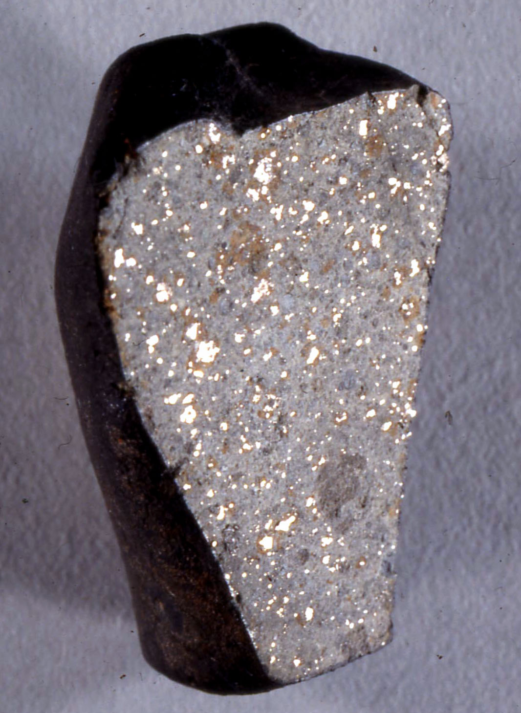 Schnittfläche des L6-Chondriten Holbrook. Die hellen Körner sind Nickeleisen. Aussen die schwarze Schmelzkruste. Höhe 5 cm.